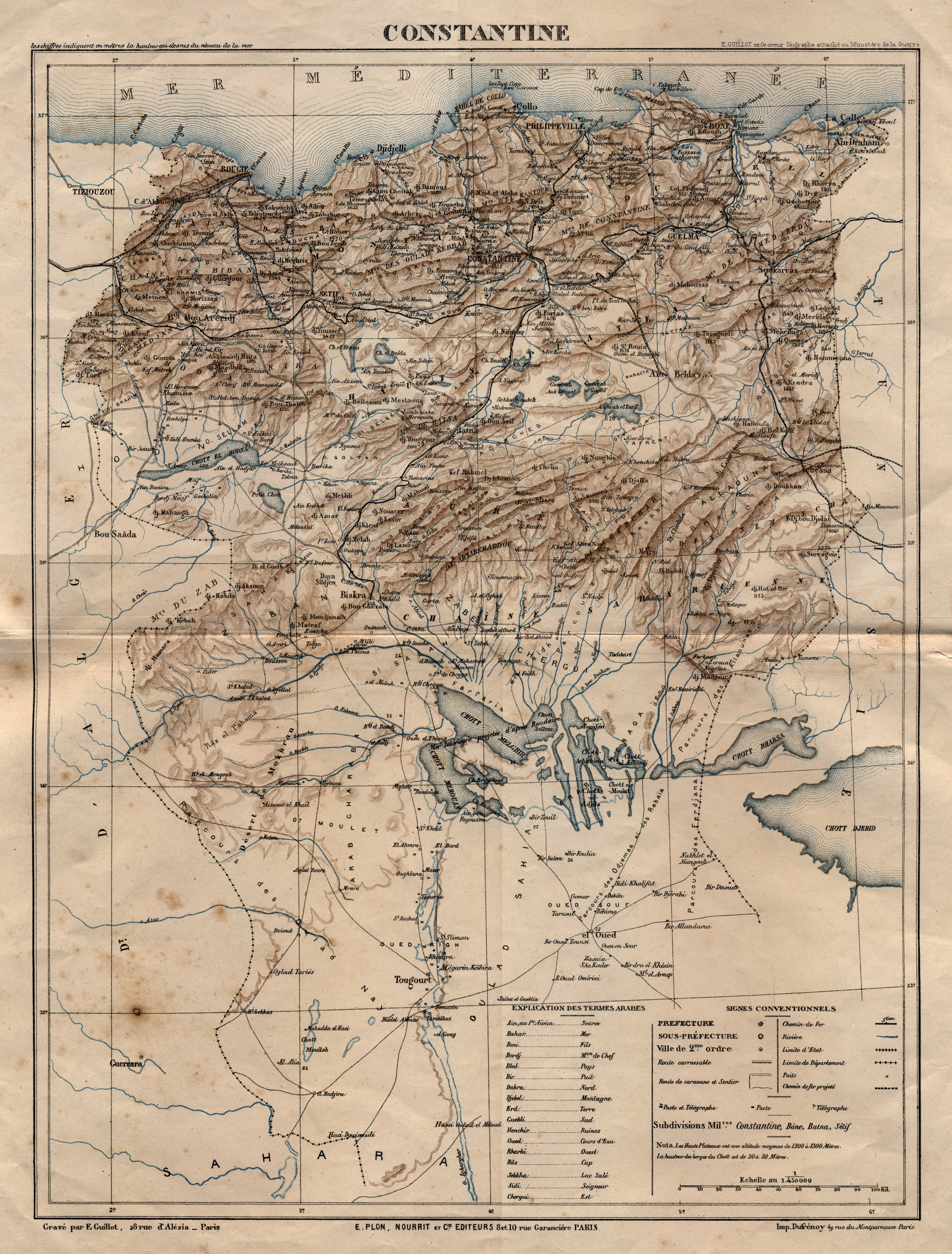 Département de Constantine (France) 1848-1955 Dimensions originales : 40x54cm